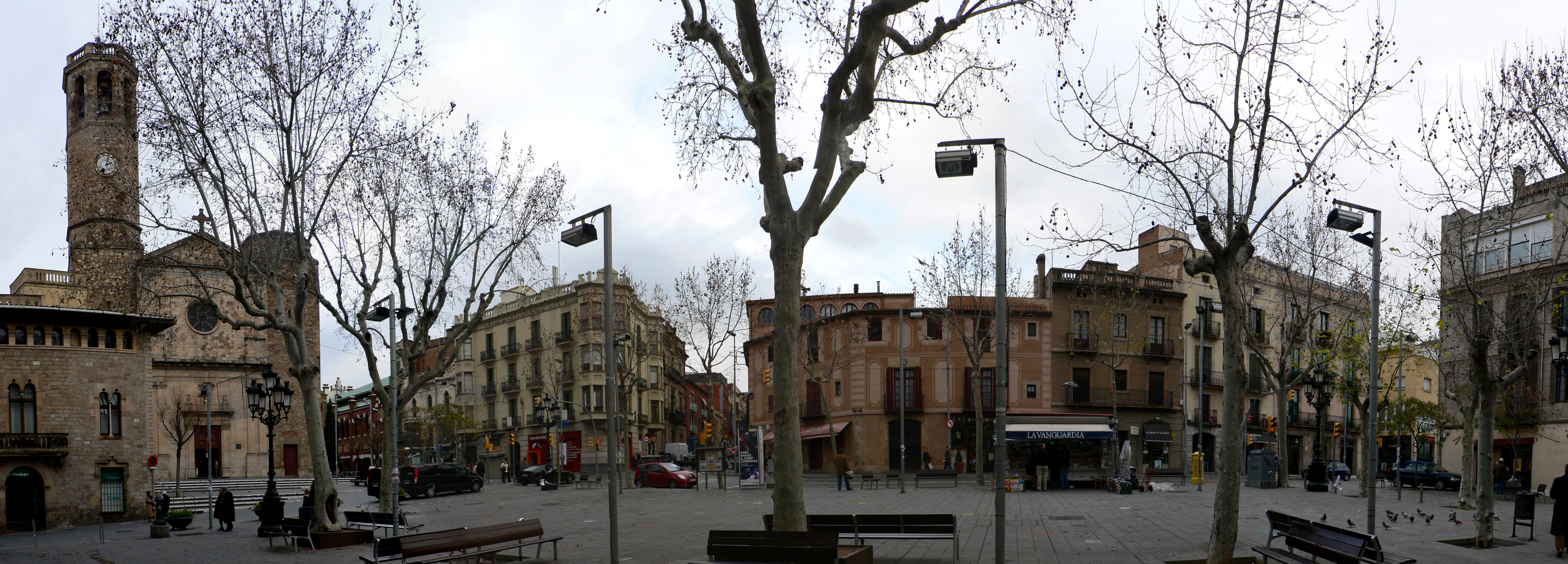 Barcelona. Plaça de Sarrià.